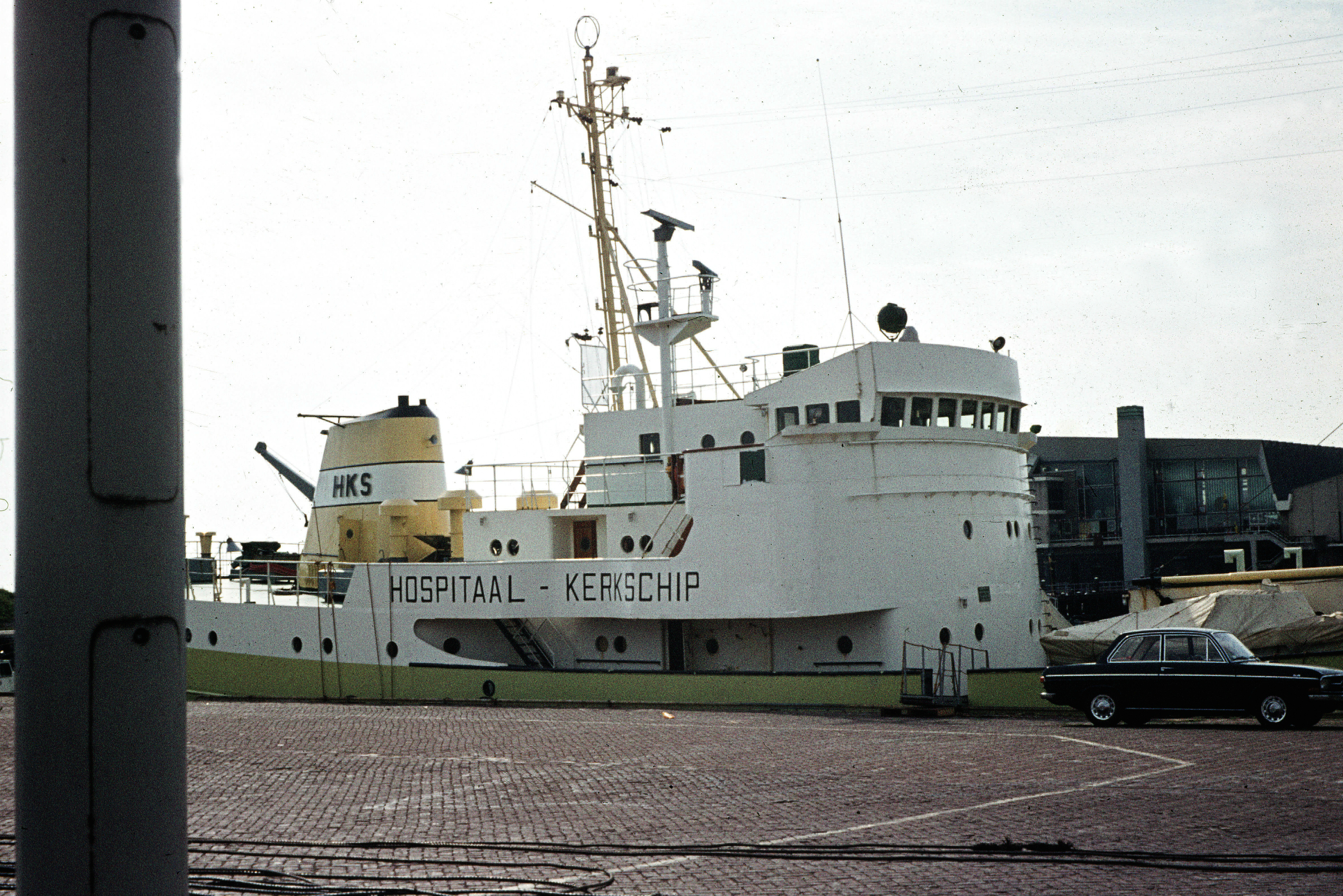 HKS De Hoop, Teilansicht, im Hafen von Scheveningen